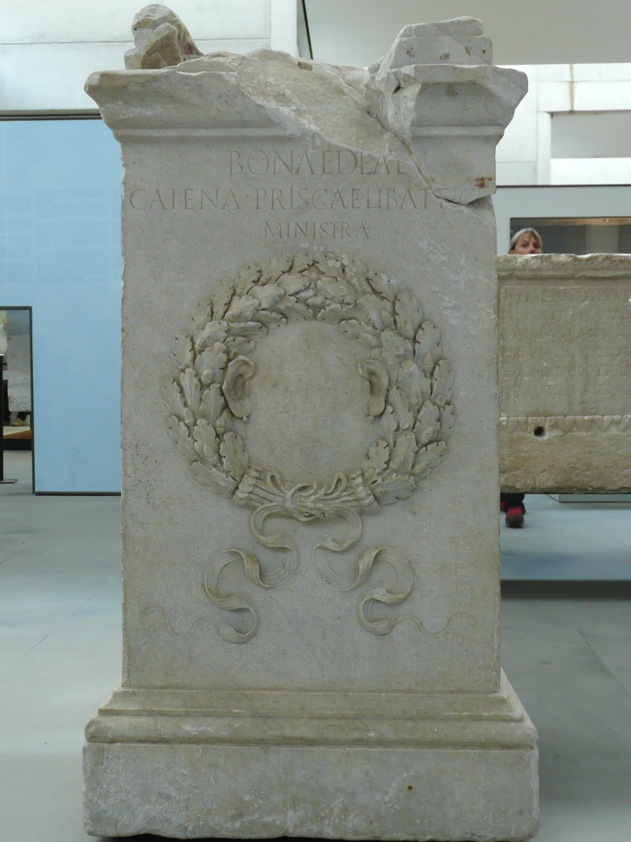 A Arles (Bouches-du-Rhône, France), au musée départemental de l'Arles antique, trouvé en 1758 sur le site de l'église-Notre-Dame-la-Major, autel en marbre du 1er siècle, dit de la Bonne Déesse, assimilable à Cybèle, car autel analogue à celui trouvé à Glanum dans le temple d'Attis; les deux oreilles sont le symbole de l'attention bienveillante de la déesse.